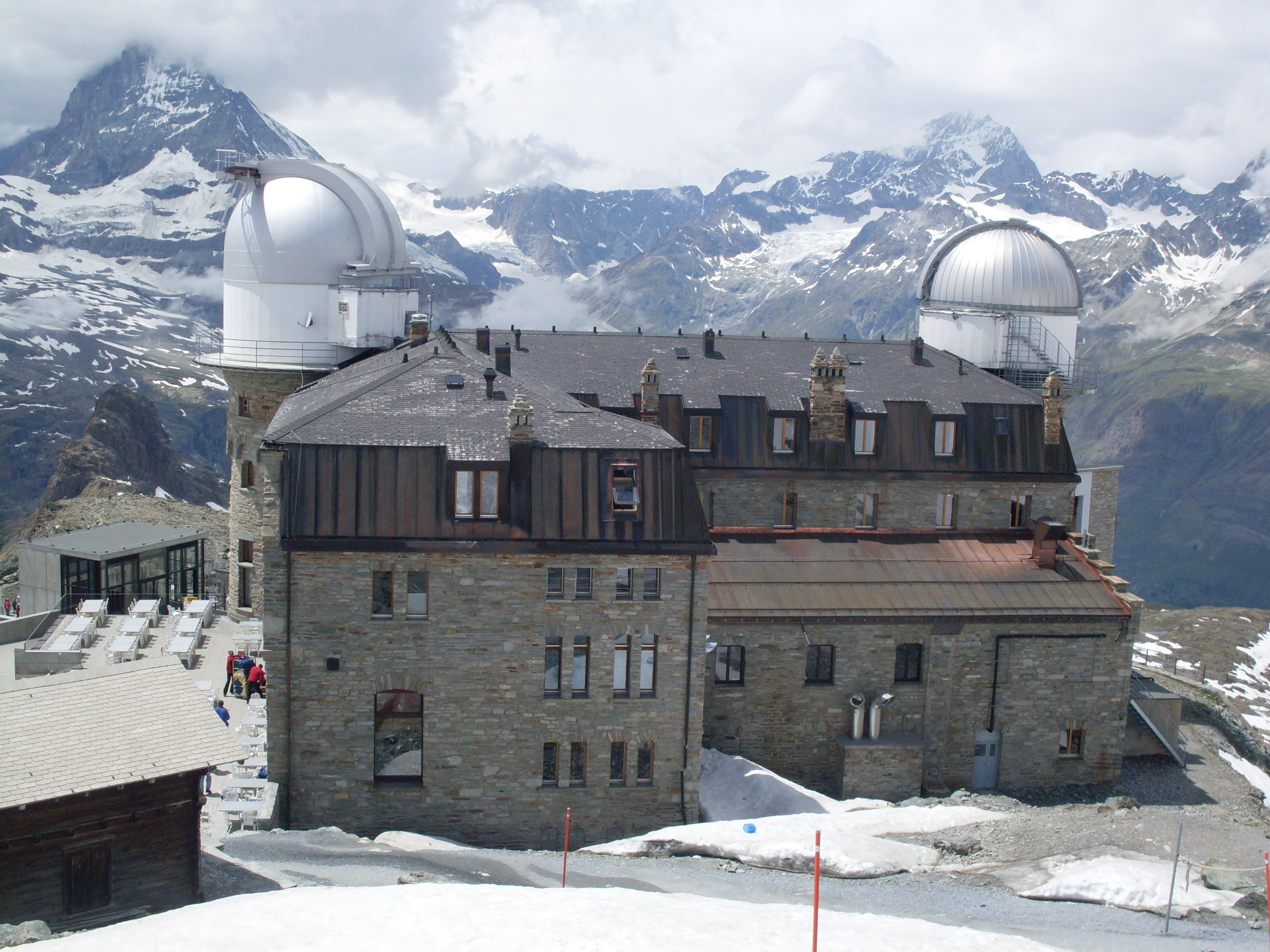 Osservatorio del Gornergrat, Zermatt, Svizzera